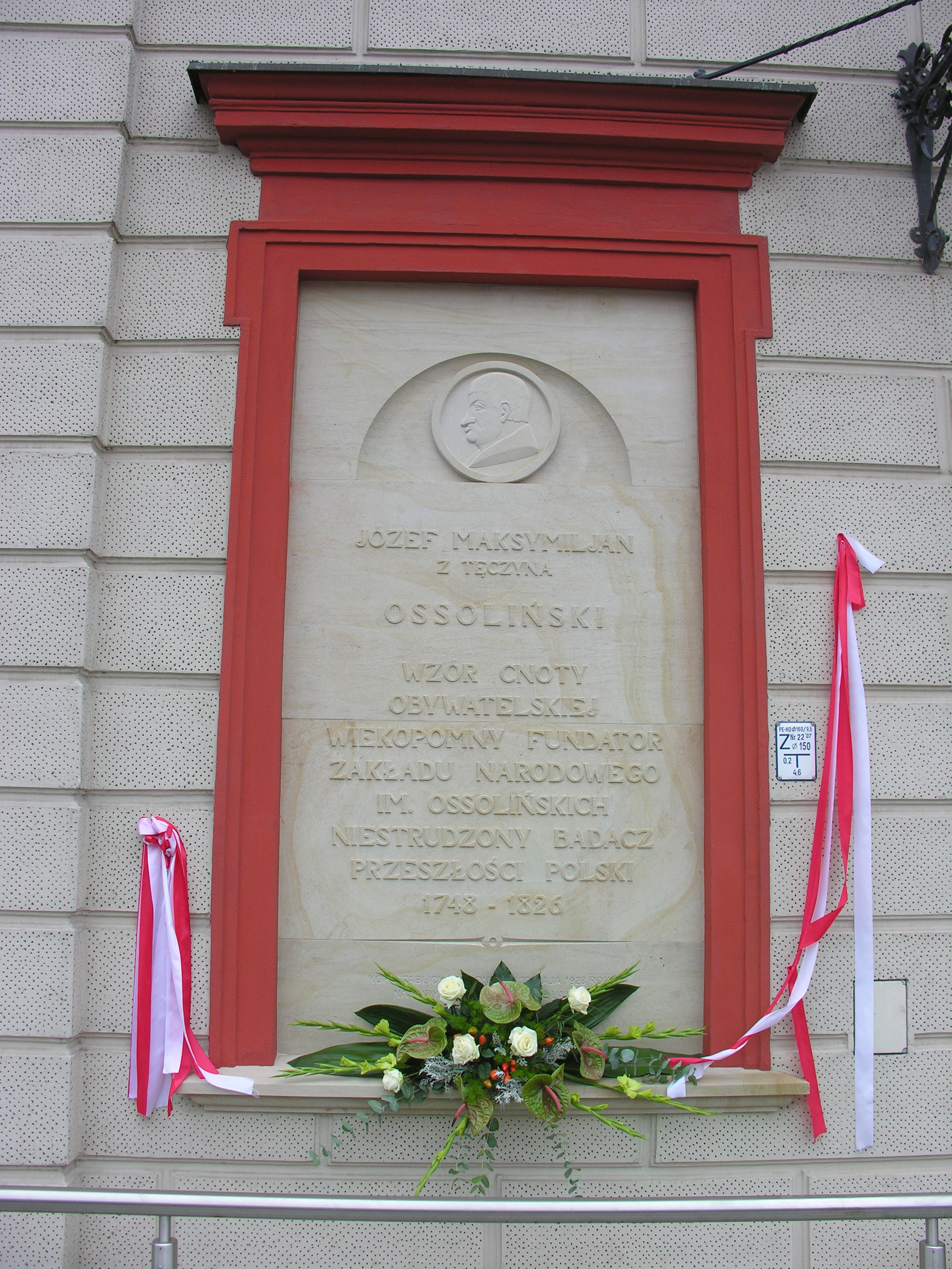 Tablica ku czci Józefa Maksymiliana Ossolińskiego we Wrocławiu na budynku Biblioteki Ossolineum od strony ul. Grodzkiej. Odsłonięta 24 X 2007 r. Jest to kopia tablicy umieszczonej na lwowskiej siedzibie Ossolineum w 1928 r., która została zniszczona po II wojnie światowej